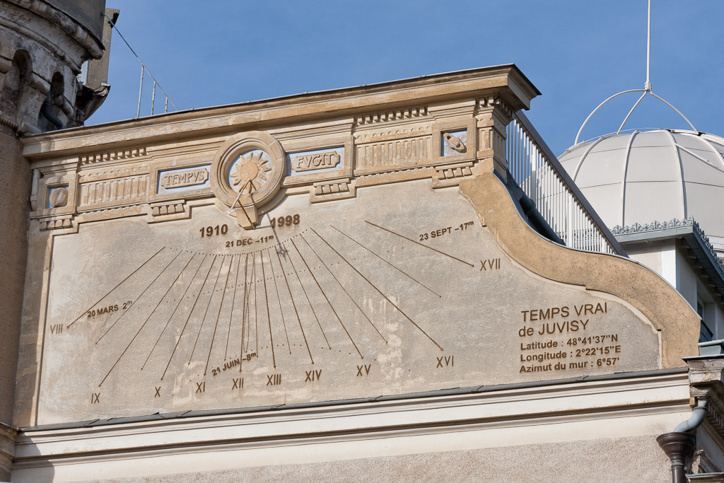 le cadran solaire de l'Observatoire, Juvisy-sur-Orge.